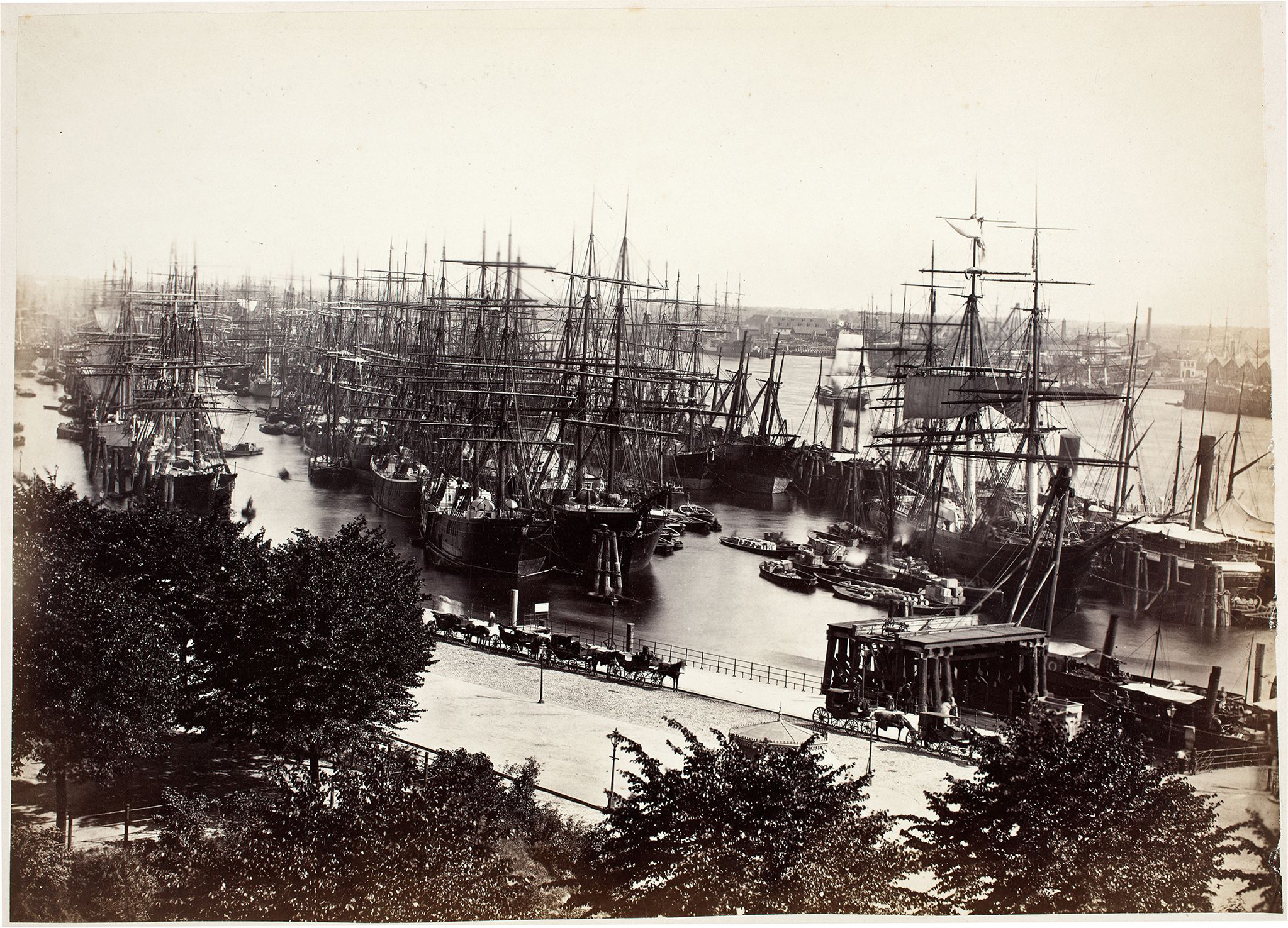 Hamburger Hafen, um 1883 Albuminpapier